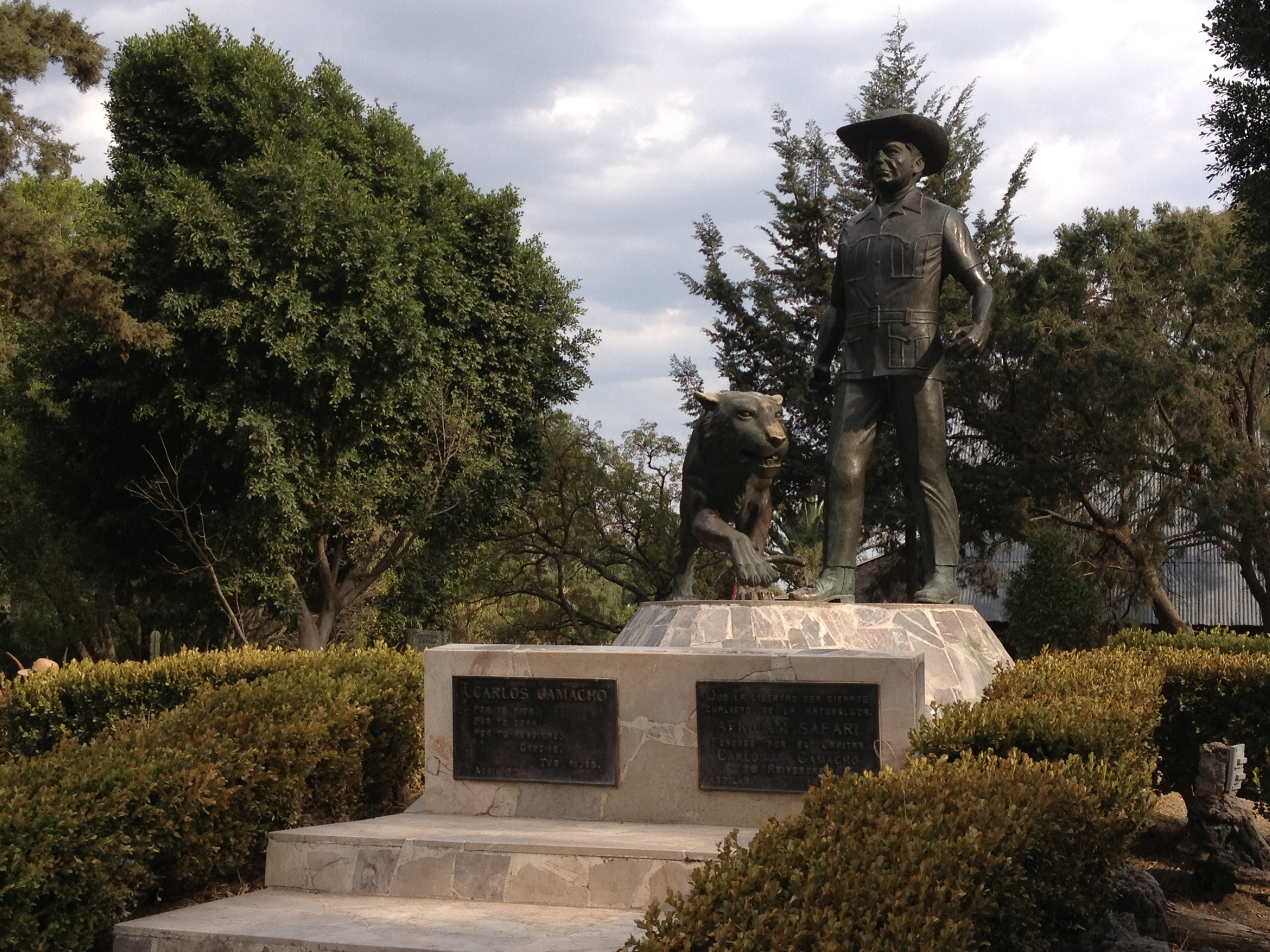 Estatua del Capitán Carlos Camacho Espíritu, fundador del zoológico Africam Safari de Puebla, México.